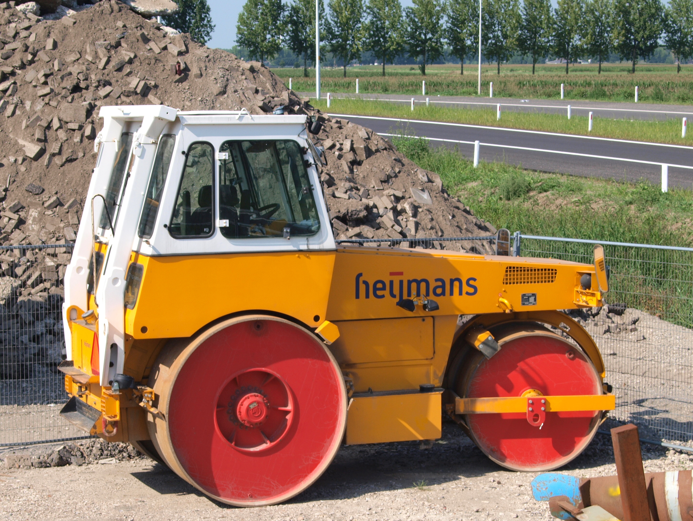 Hamm roller, Heijmans.